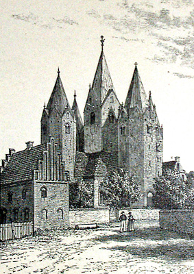 Kalundborg Kirke. Opført af Esben Snare med 5 Taarne; det miderste styrtede ned i Aaret 1827, men genopførtes ved Kirkens Restauration, der fuldendtes i 1871.